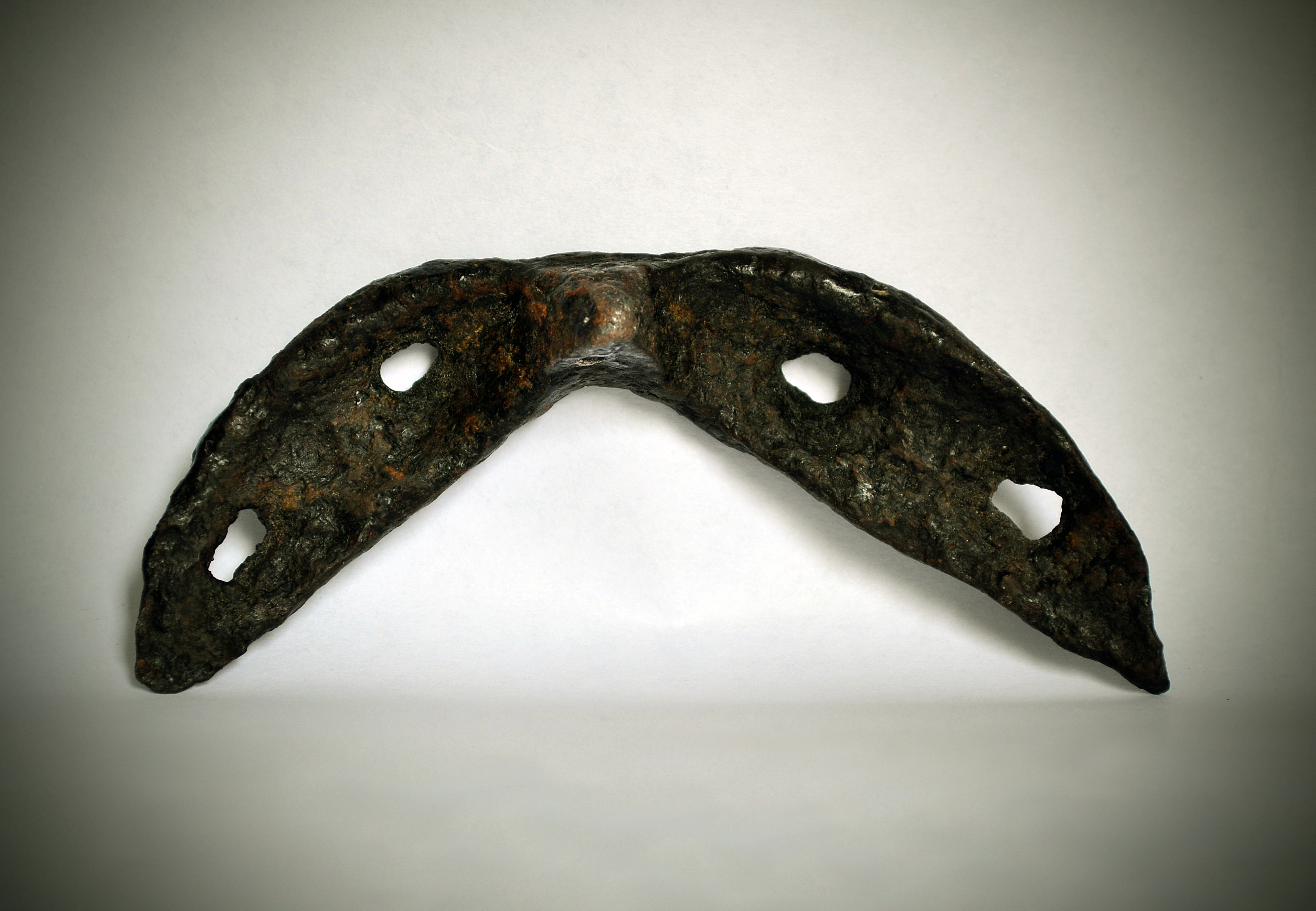 Древнерусская подкова,Рязанское княжество,13 век.